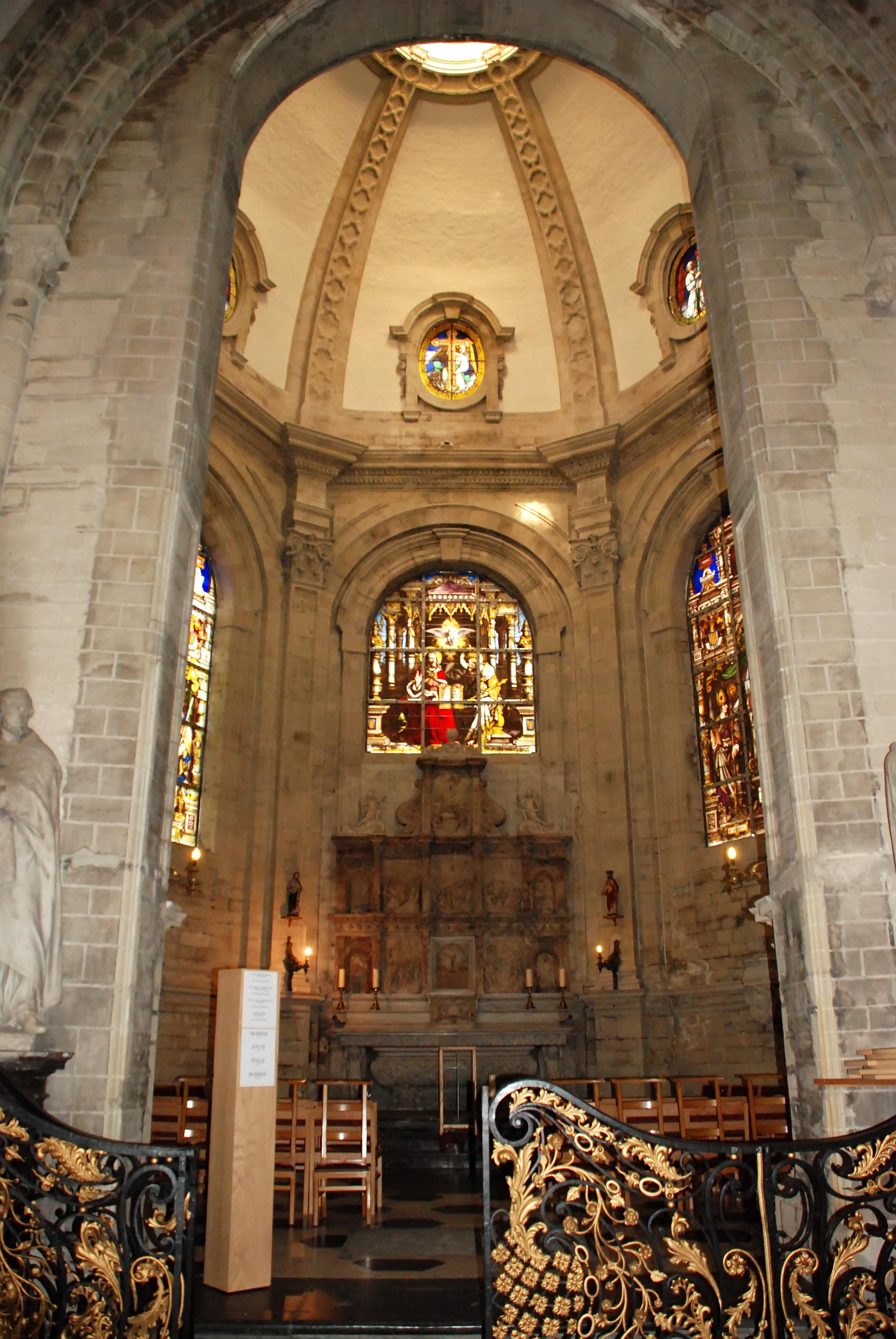 Belgique - Bruxelles - Cathédrale Saints-Michel-et-Gudule de Bruxelles - Chapelle Maes